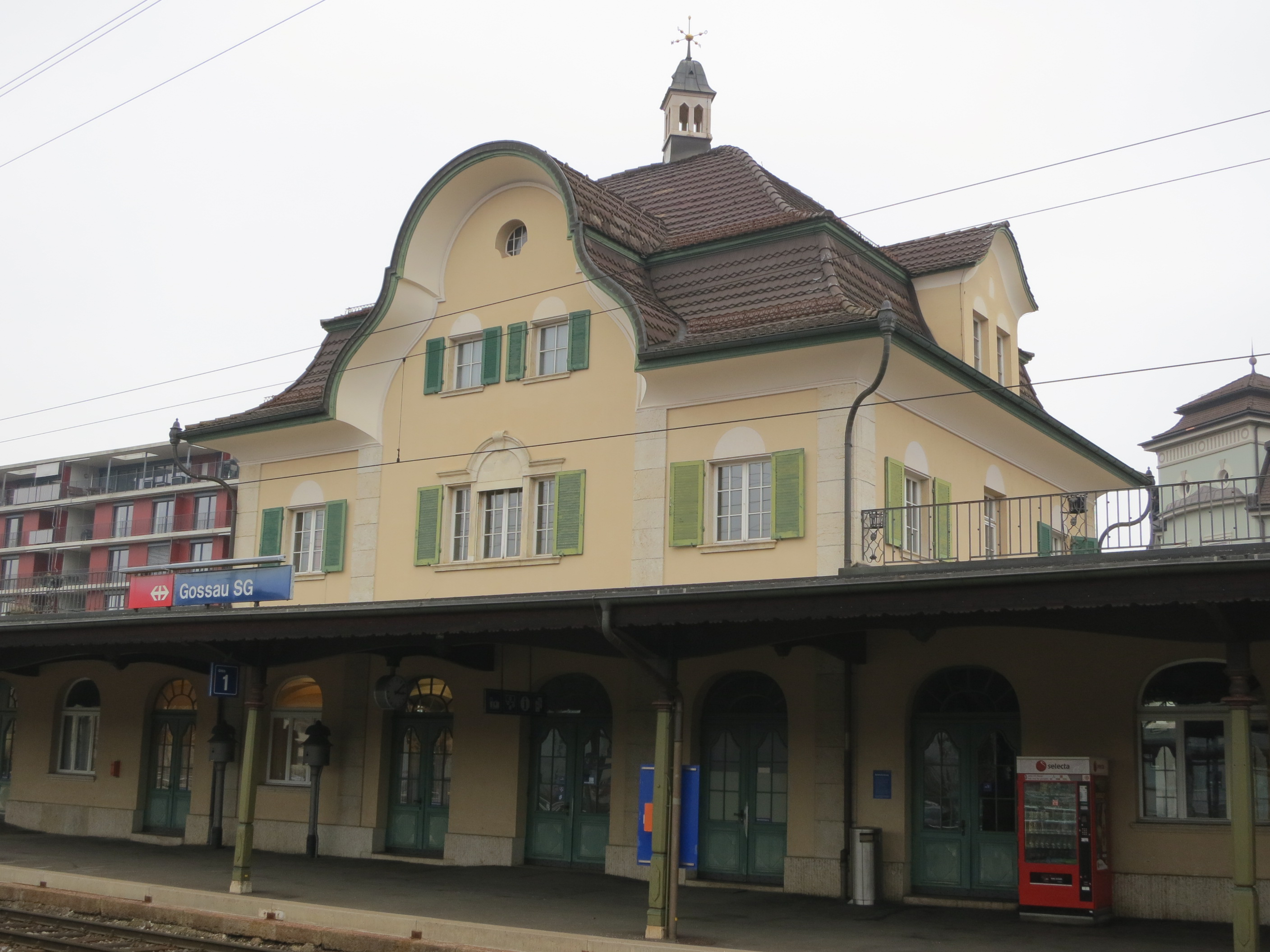 Bahnhof, Gossau SG, Schweiz